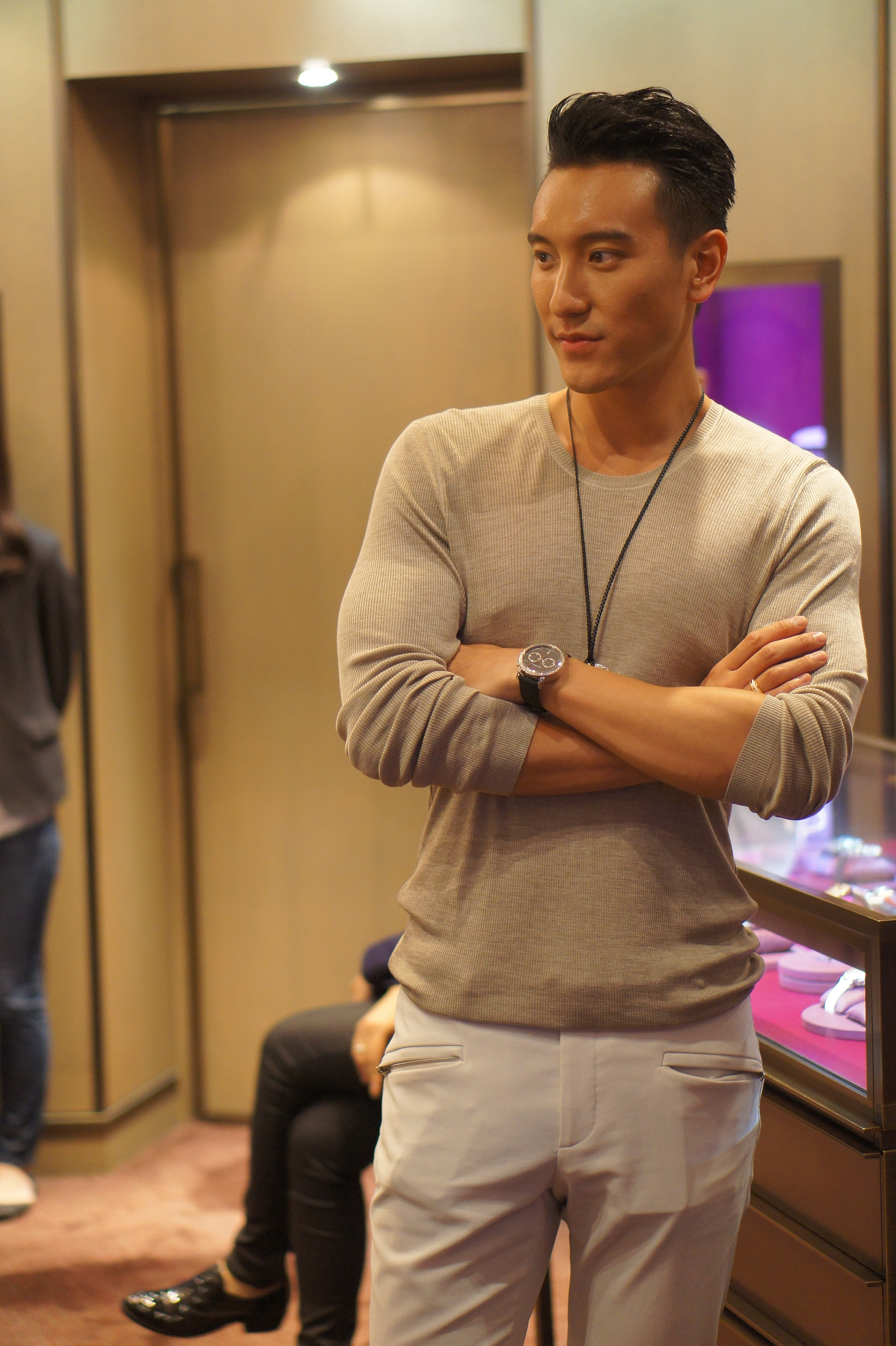 臺灣演員王陽明出席微風廣場2012年微風之夜。